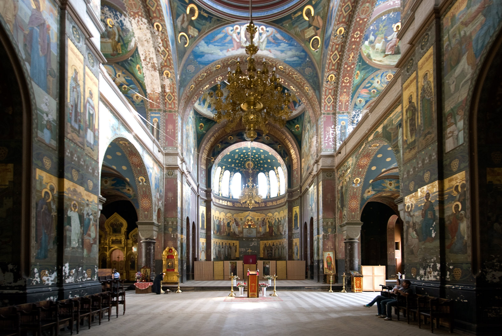 Inside the New Athos Monastery, Abchasia.